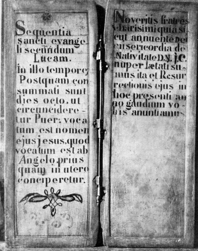 Die Consulardiptychen und verwandte Denkmäler, N33, Apion O 539 (Oviedo)